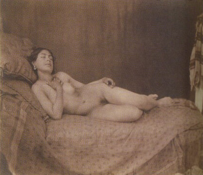 Nu allongé, étude n°531 Bibliothèque nationale de France, département des Estampes et de la Photographie